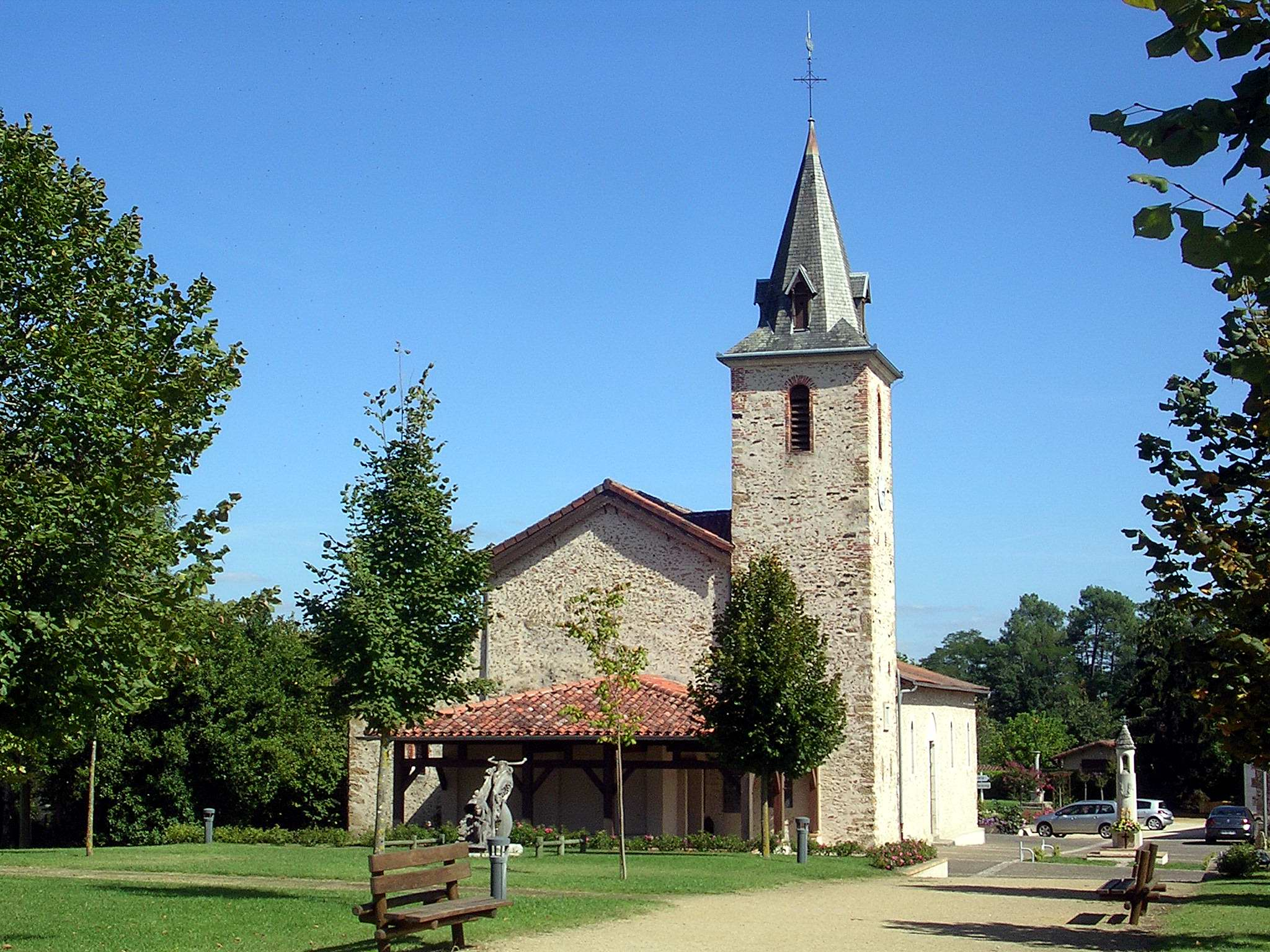 Eglise de Laglorieuse, dans le département français des Landes